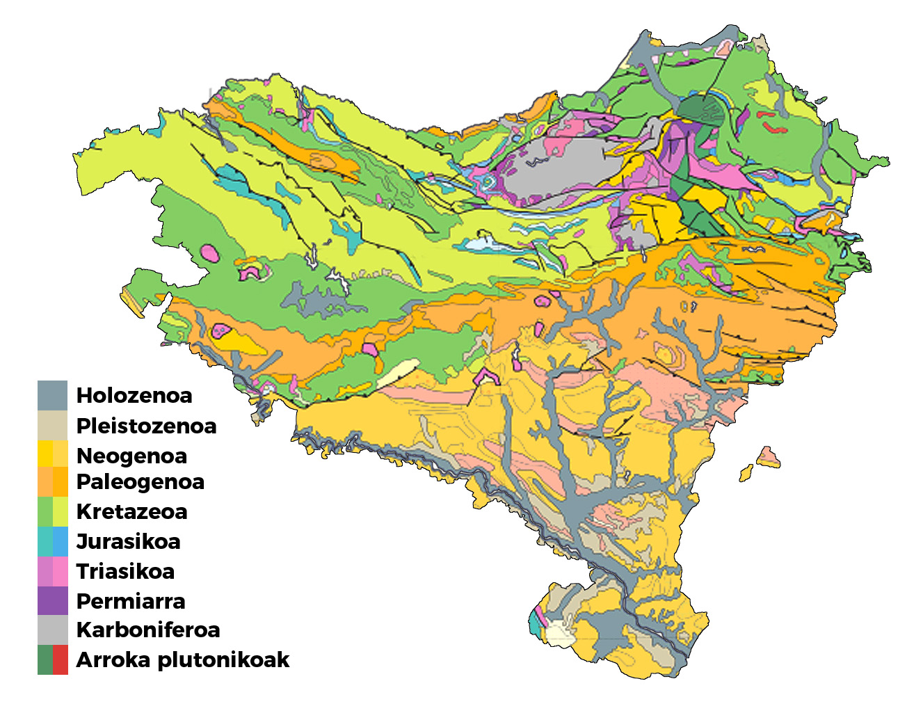 Berriro marraztua hainbat iturrietatik. Mapa sinplifikatua.